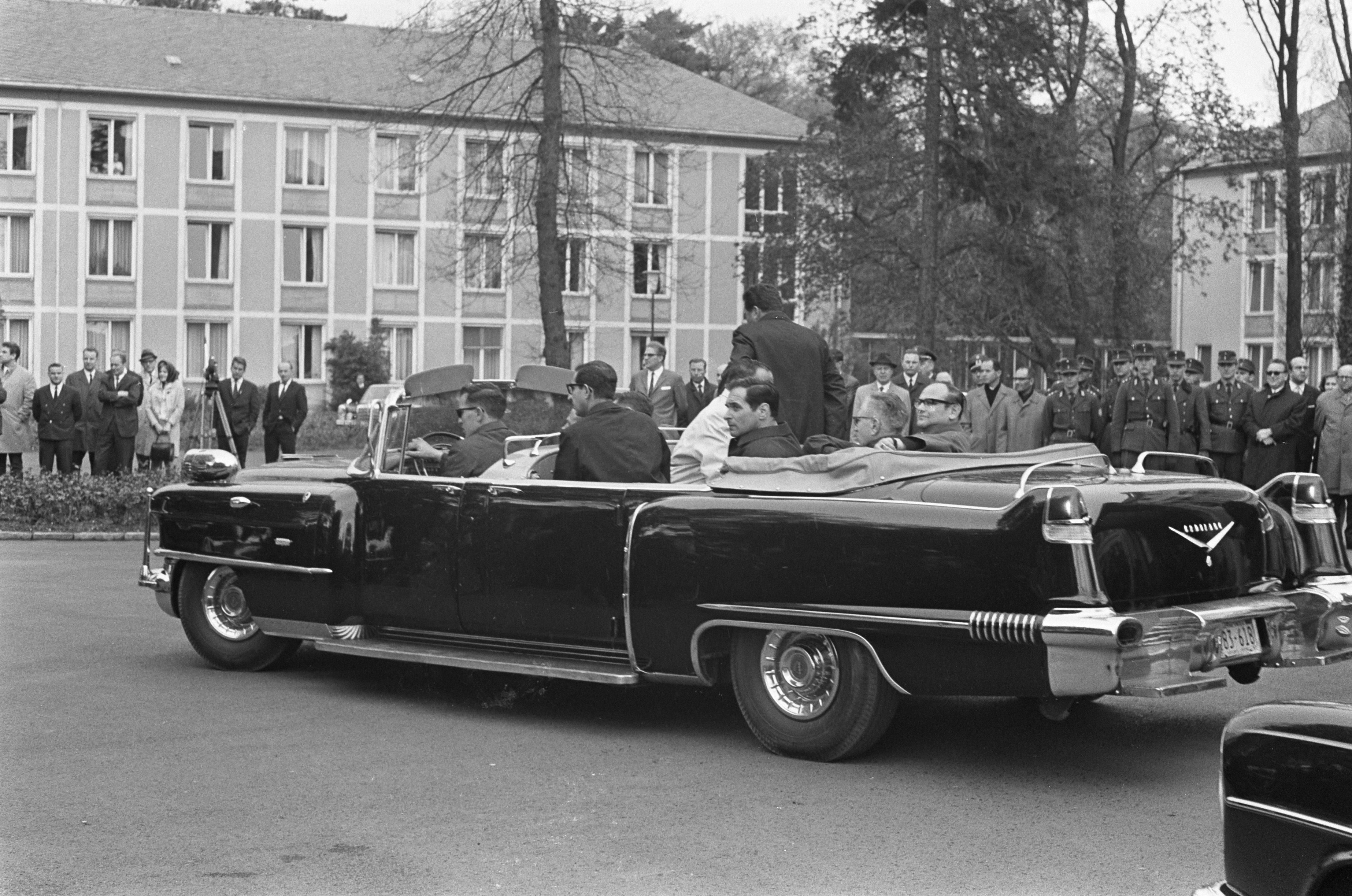 Collectie / Archief : Fotocollectie Anefo Reportage / Serie : [ onbekend ] Beschrijving : President Johnson (USA) had besprekingen met Kiesinger te Bonn, lijfwacht President Johnson Datum : 24 april 1967 Locatie : Amerika, Bonn Trefwoorden : besprekingen Persoonsnaam : Johnson, Lyndon B., Kiesinger Fotograaf : Merk, Ben / Anefo Auteursrechthebbende : Nationaal Archief Materiaalsoort : Negatief (zwart/wit) Nummer archiefinventaris : bekijk toegang 2.24.01.05 Bestanddeelnummer : 920-2596